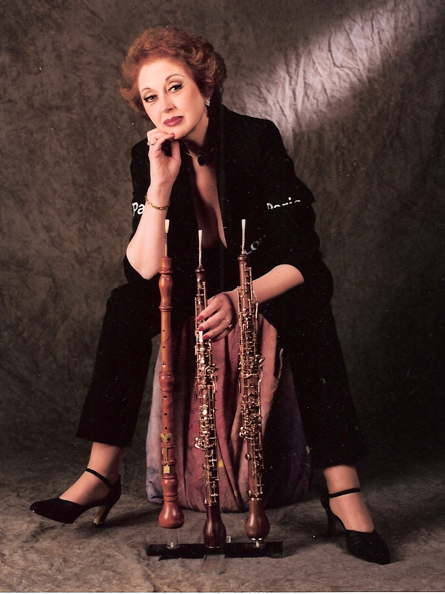 Photographie de Jennifer Paull, une des plus grandes spécialiste du hautbois d'amour au XXème siècle.